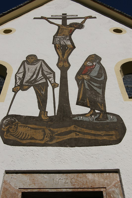 Ortskapelle hl. Rochus, Feldkapelle Frontbild